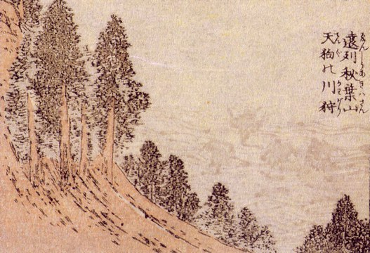 Tengu no Kawagari (遠州秋葉山 天狗の川狩) from Hokusai Manga (北斎漫画 十編)